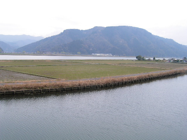 ラムサール条約登録湿地ー丸山川下流域・周辺水田（兵庫県豊岡市）＝丸山川の中州・中ノ島